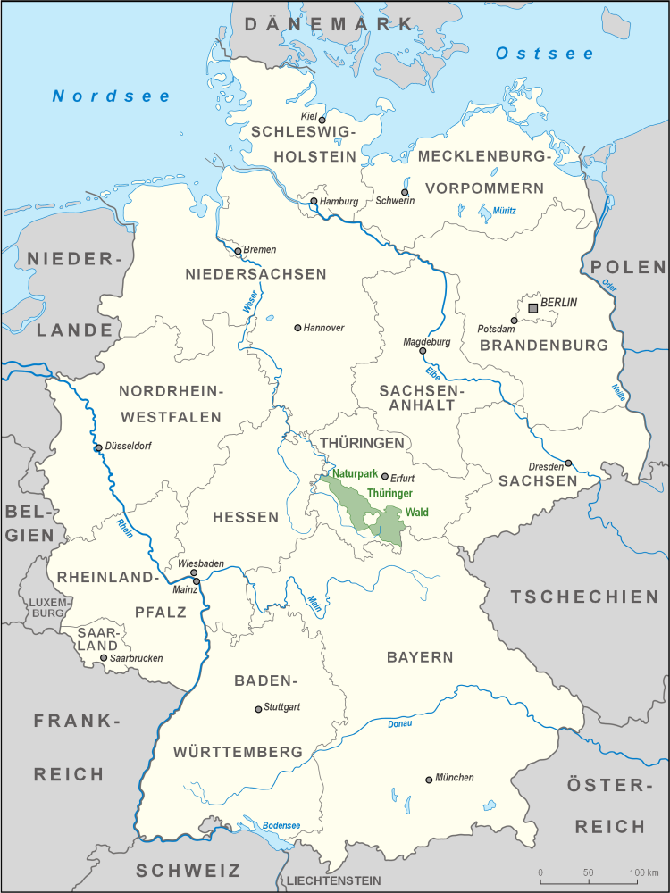 Karte des Naturparks Thüringer Wald in Deutschland